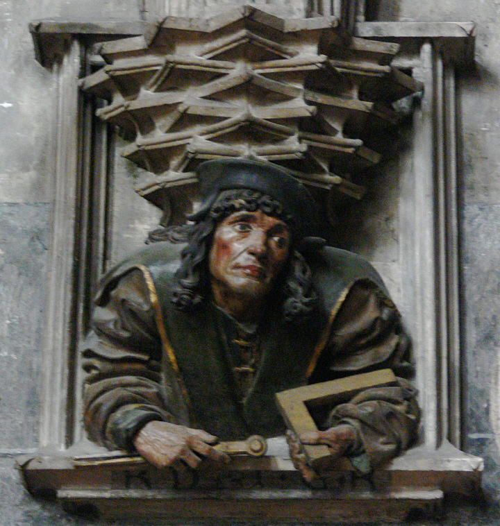 Wien, Stephansdom, Relief Anton Pilgram